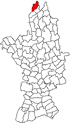 Categorie:Hărţi ale judeţului Olt